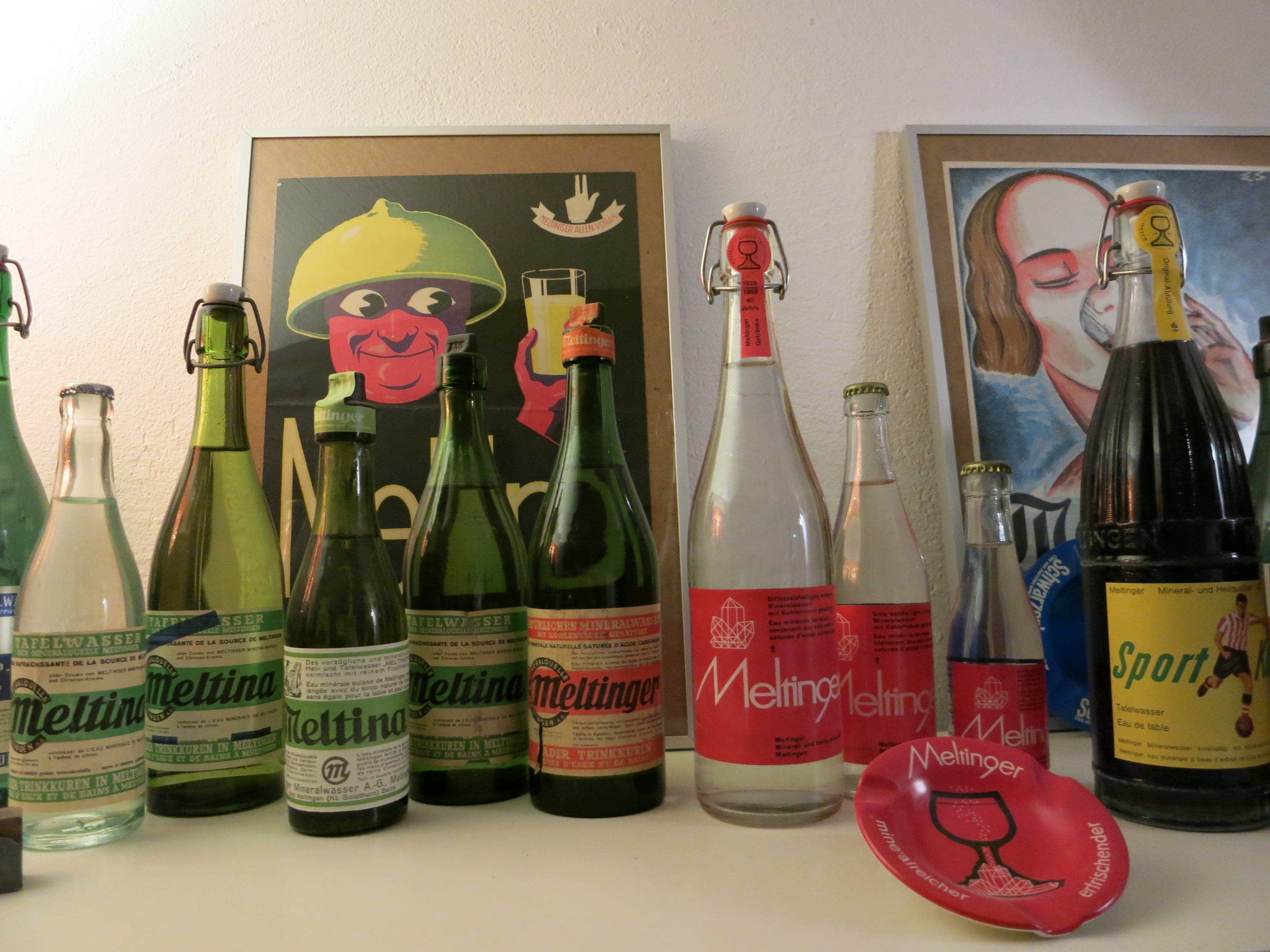 historische Meltina Flaschen, Mineralwasser Meltingen SO, Schweiz